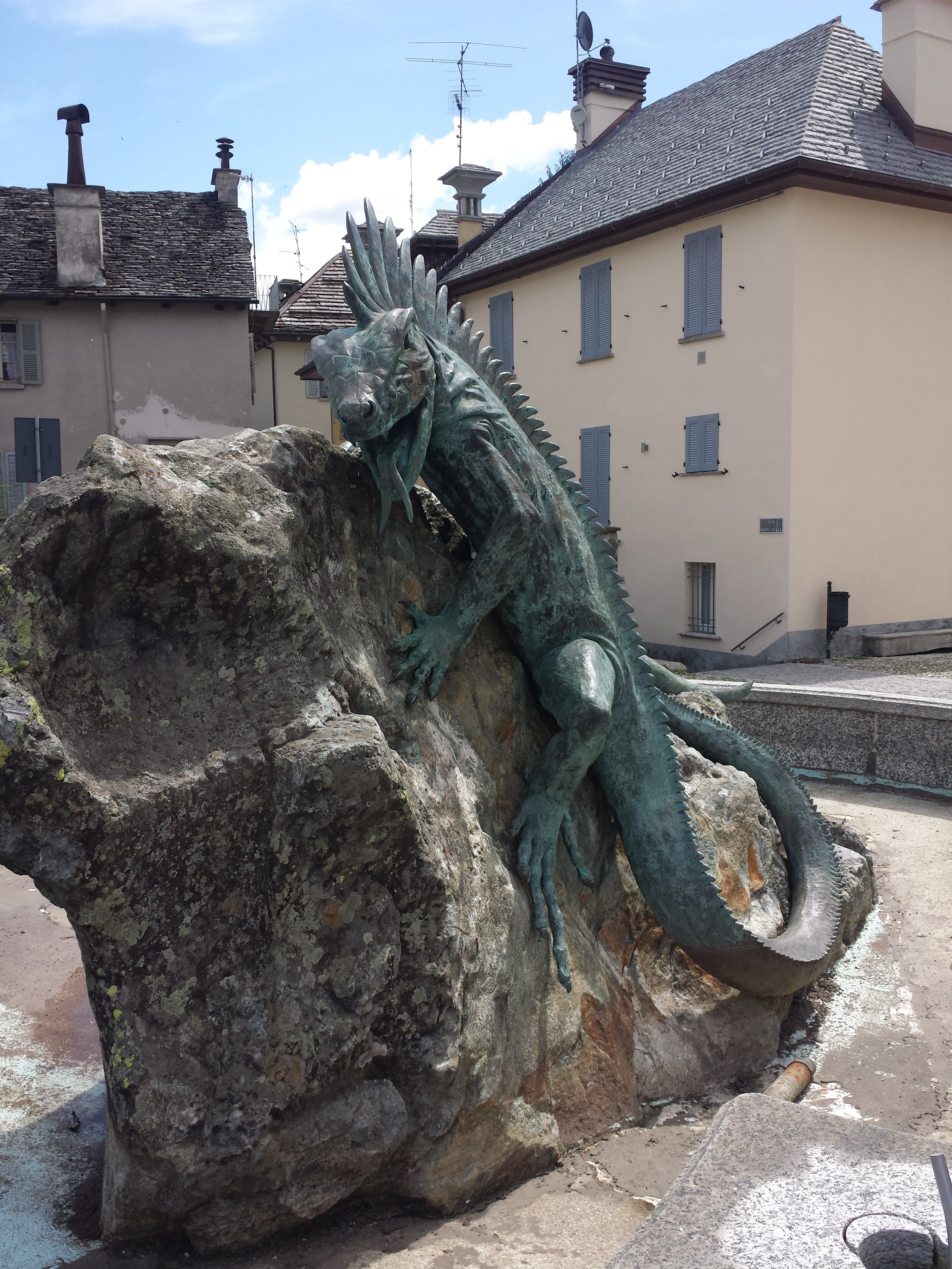 Fontana del basilisco a Malesco (frontale).